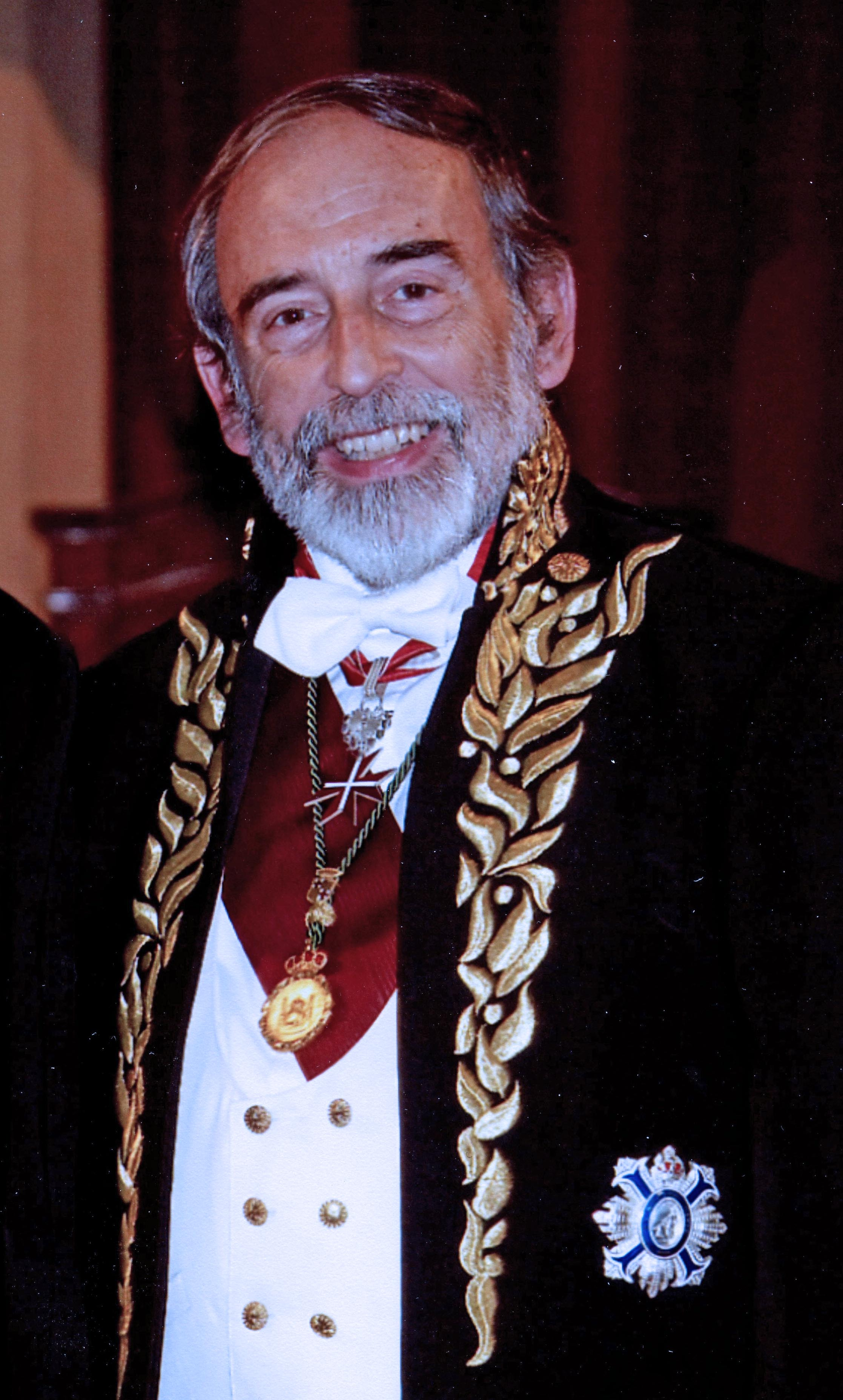 retrat fet a l'acte acadèmic d'ingrès a la RACEF del Dr. Maskins el 2009